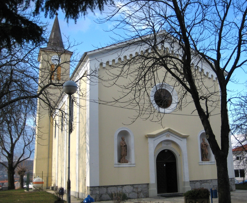 Crkva sv. Mateja u Viškovu